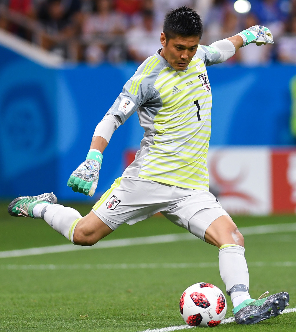 Потрясающий камбэк сборной Бельгии в матче с Японией